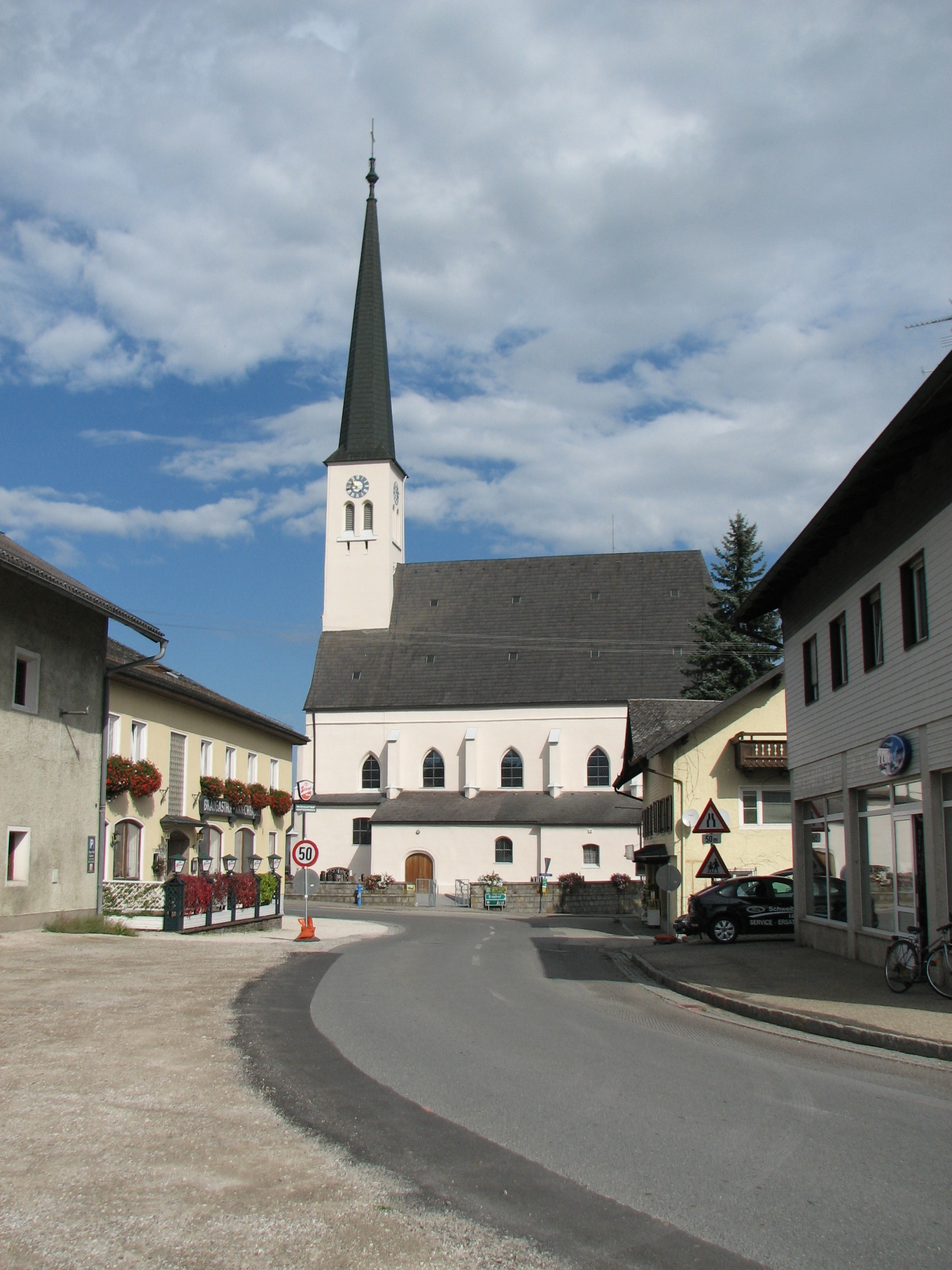 Kath. Pfarrkirche Mariä Himmelfahrt und Friedhof, Lochen am See, Oberösterreich